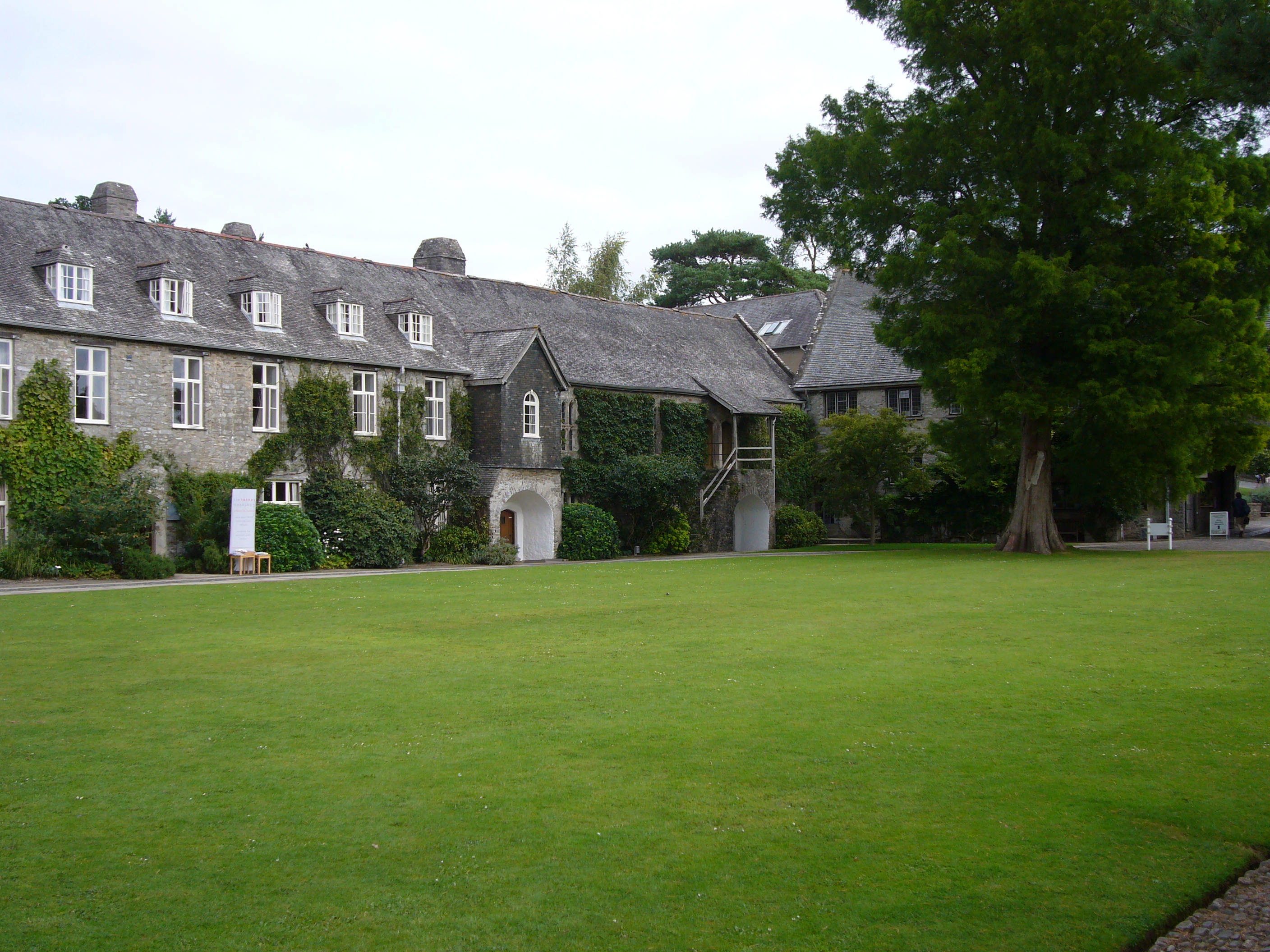 Inner quadrangle at Dartington Hall (Devon)